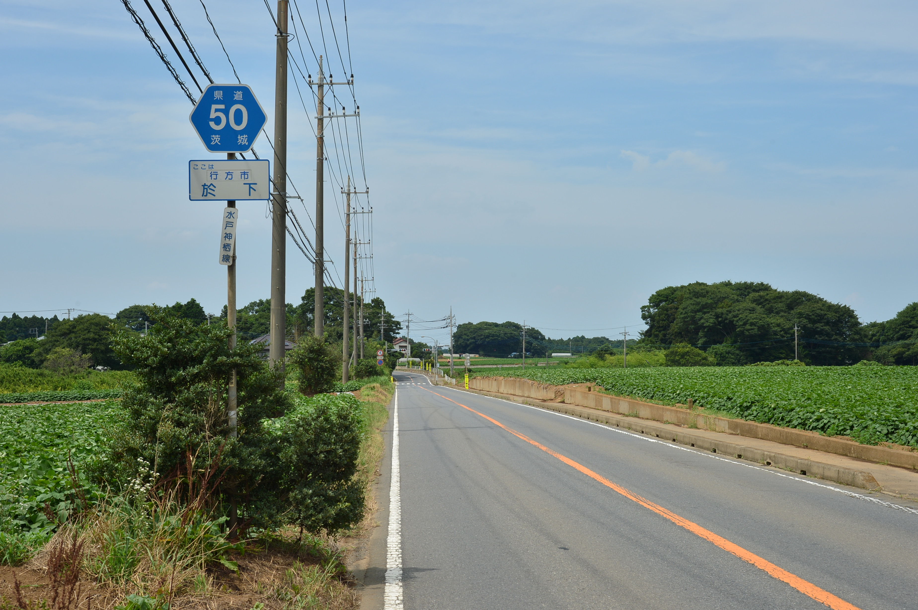 茨城県道50号水戸神栖線（行方市於下）。行方市於下地内にて。水戸方面に向けて撮影。